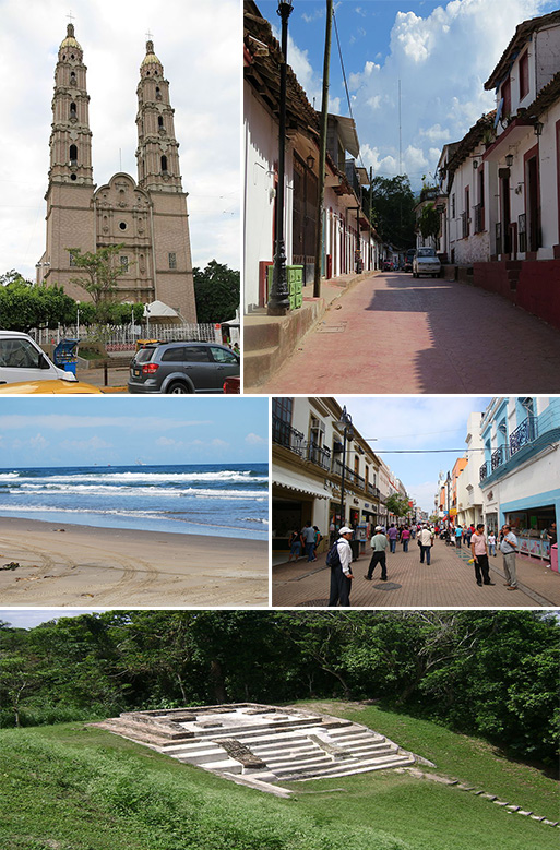 Montaje de Tabasco